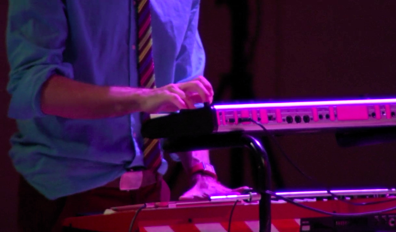 Xavi Lloses manipulant teclats. Tenora 2.0. Fòrum IMPULSA 2012. Teclat, piano i producció de directe amb manipulació de bases rítmiques